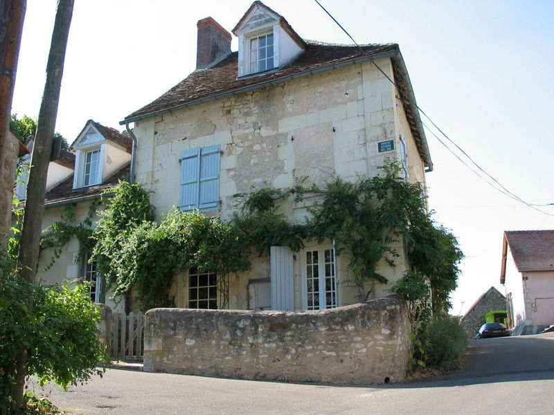 Une maison au centre de Boussay - été 2003 - Nicolas Guilmain